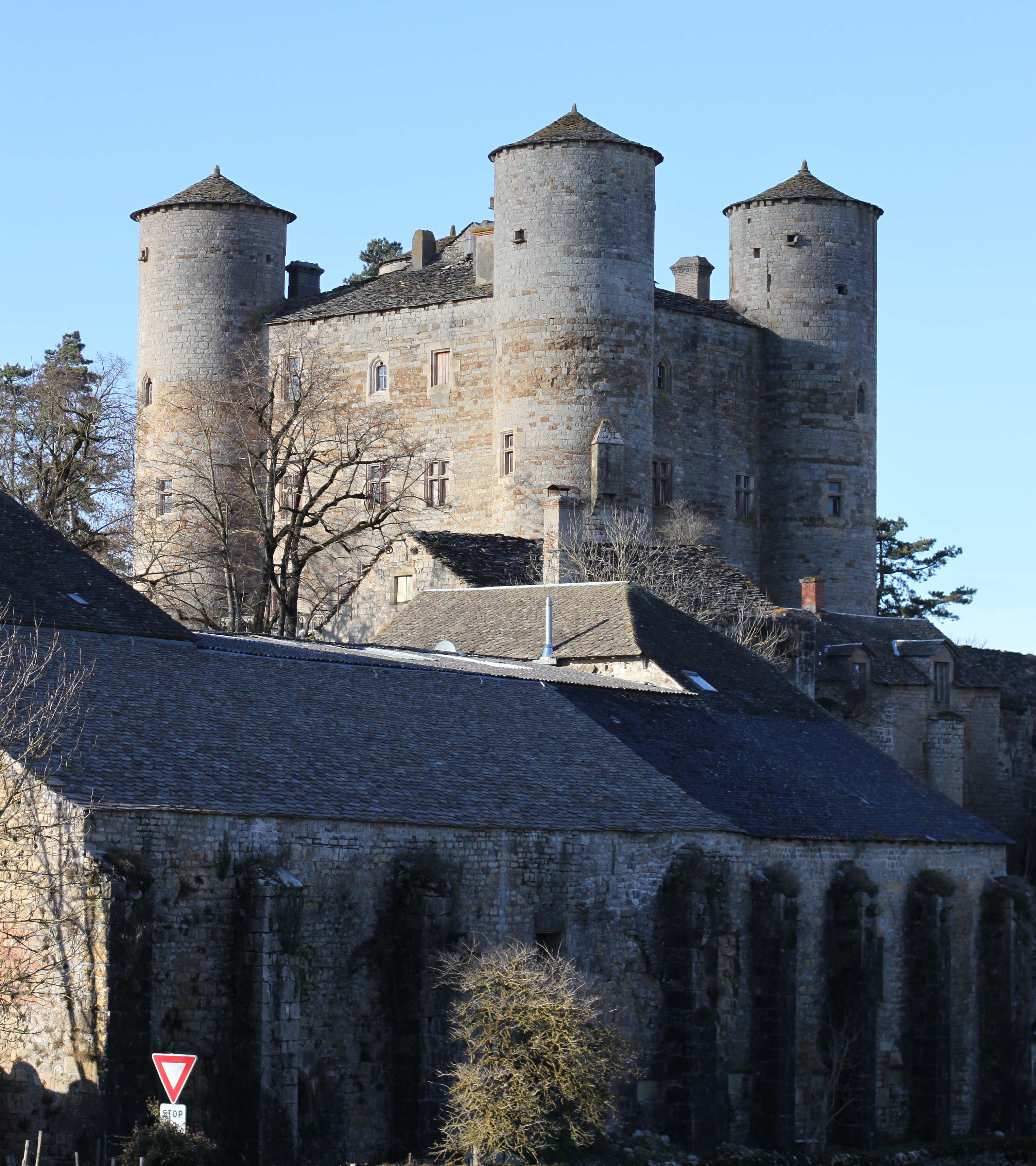 Château de Loupiac, Lapanouse, Aveyron, France